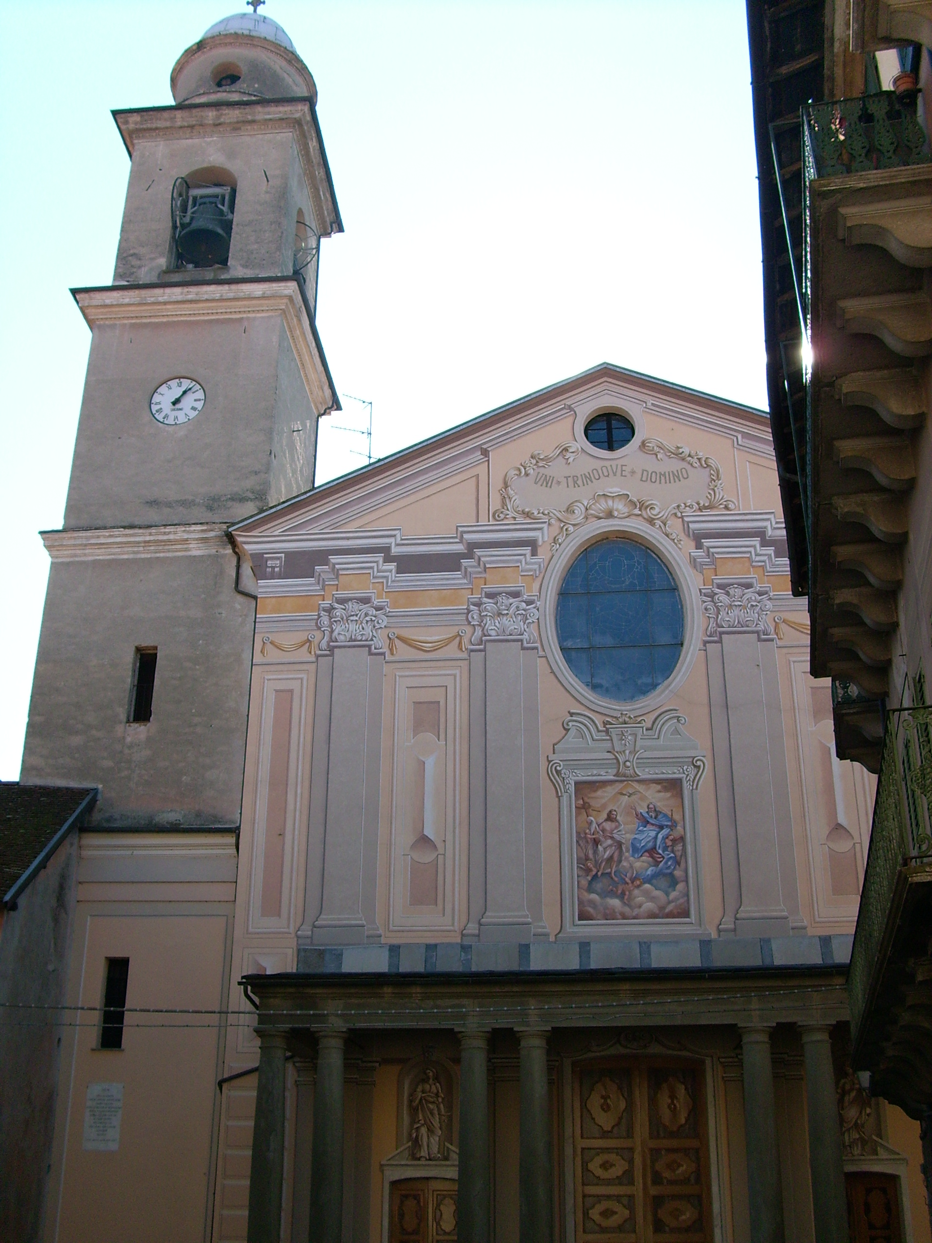 Chiesa della Santissima Trinità presso Sassello, Liguria, Italia